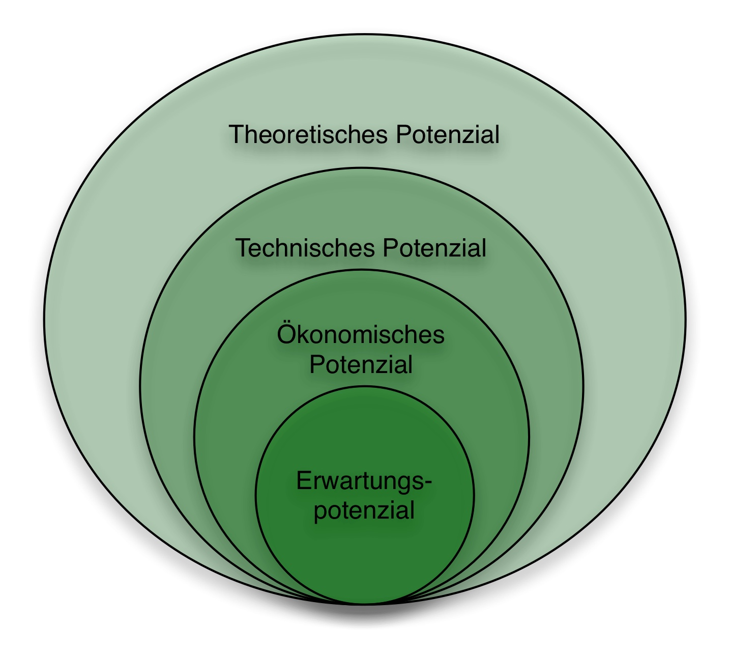 "Zwiebel"Grafik Biomassepotenziale: Vom umfassenden Potenzial zu eingeschränkteren Potenzialen.